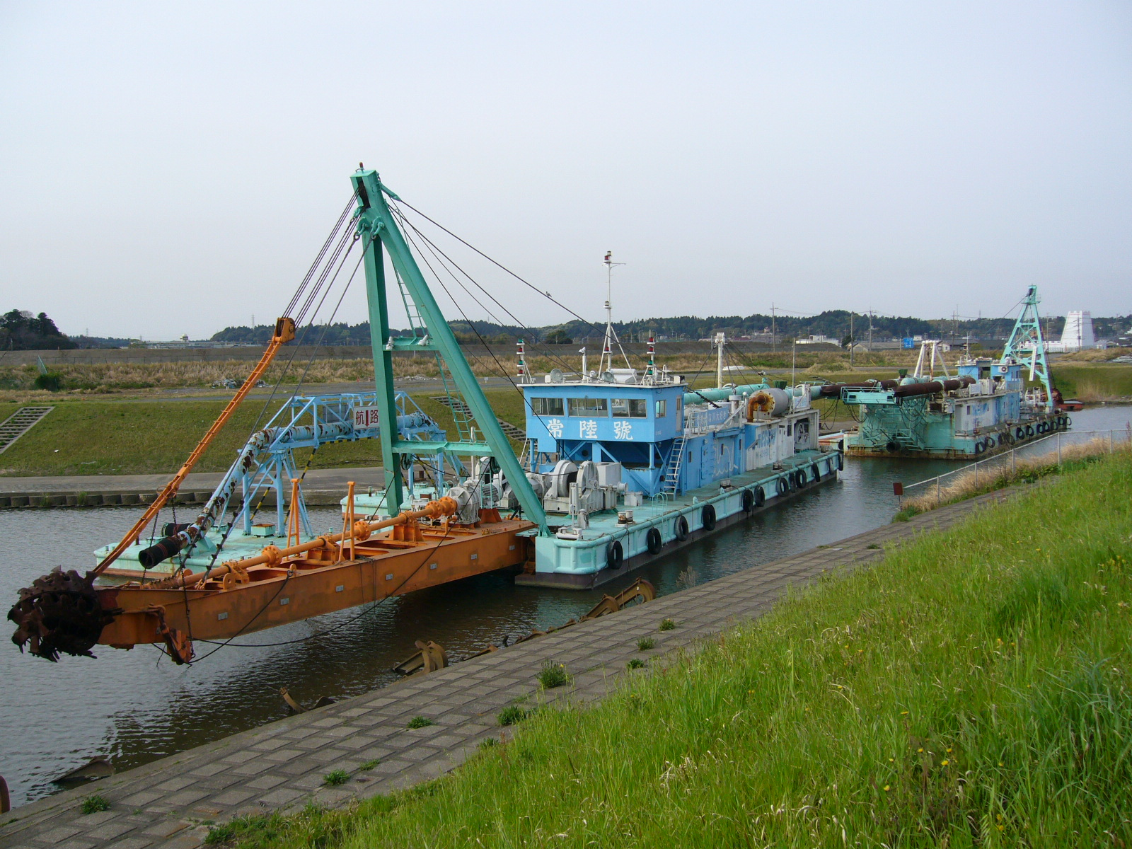 pomp-dredger,katori-city,japan